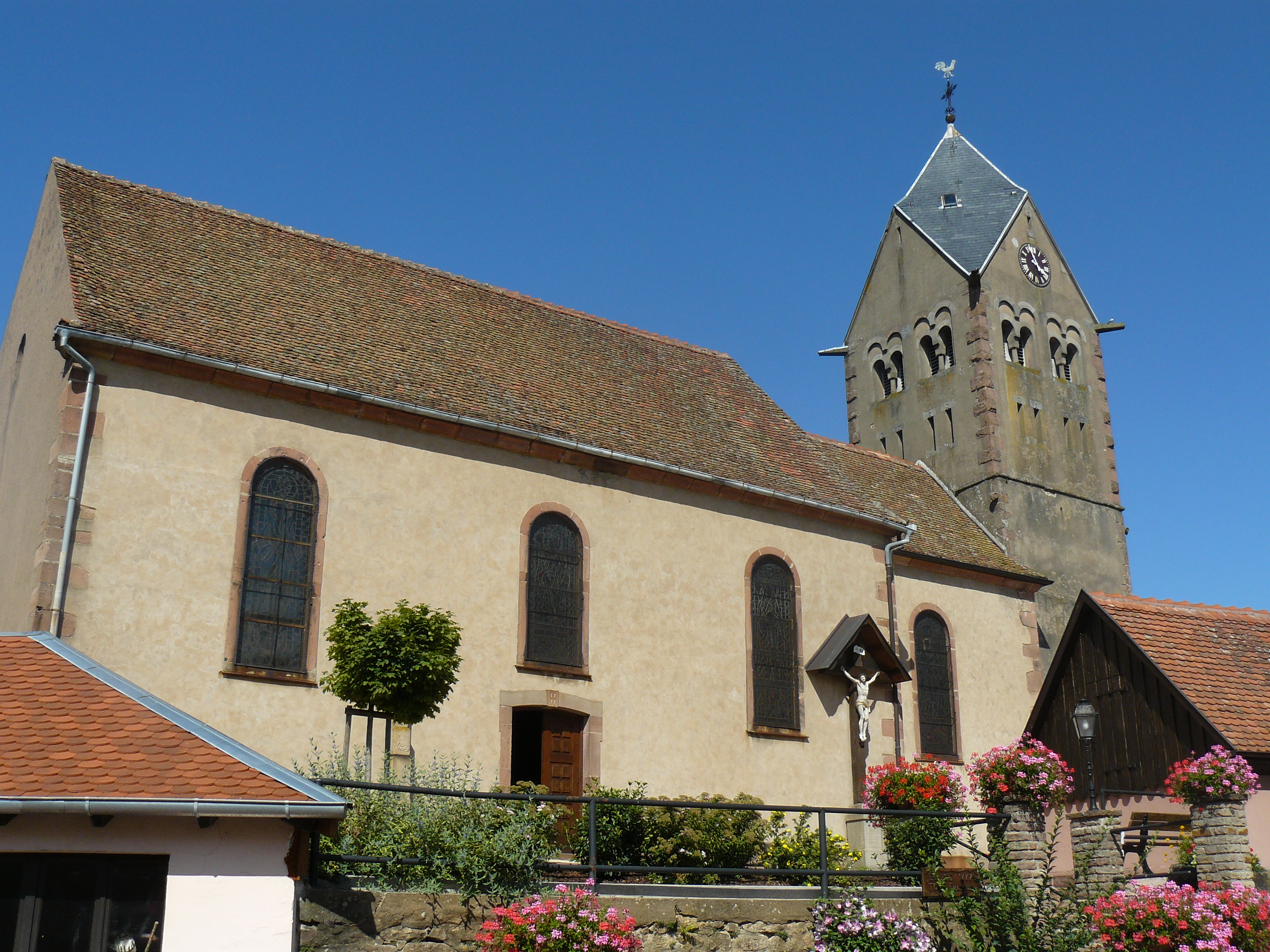 Église Saint Rémy